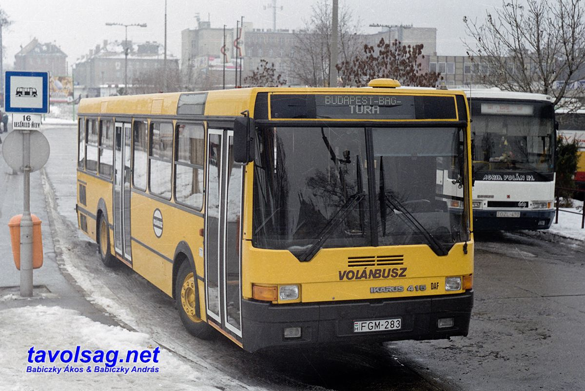 Ikarus 415 (FGM-283) elővárosi-városi szóló autóbusz Népstadion autóbusz-állomáson, Budapesten (gyártási év: 1995)